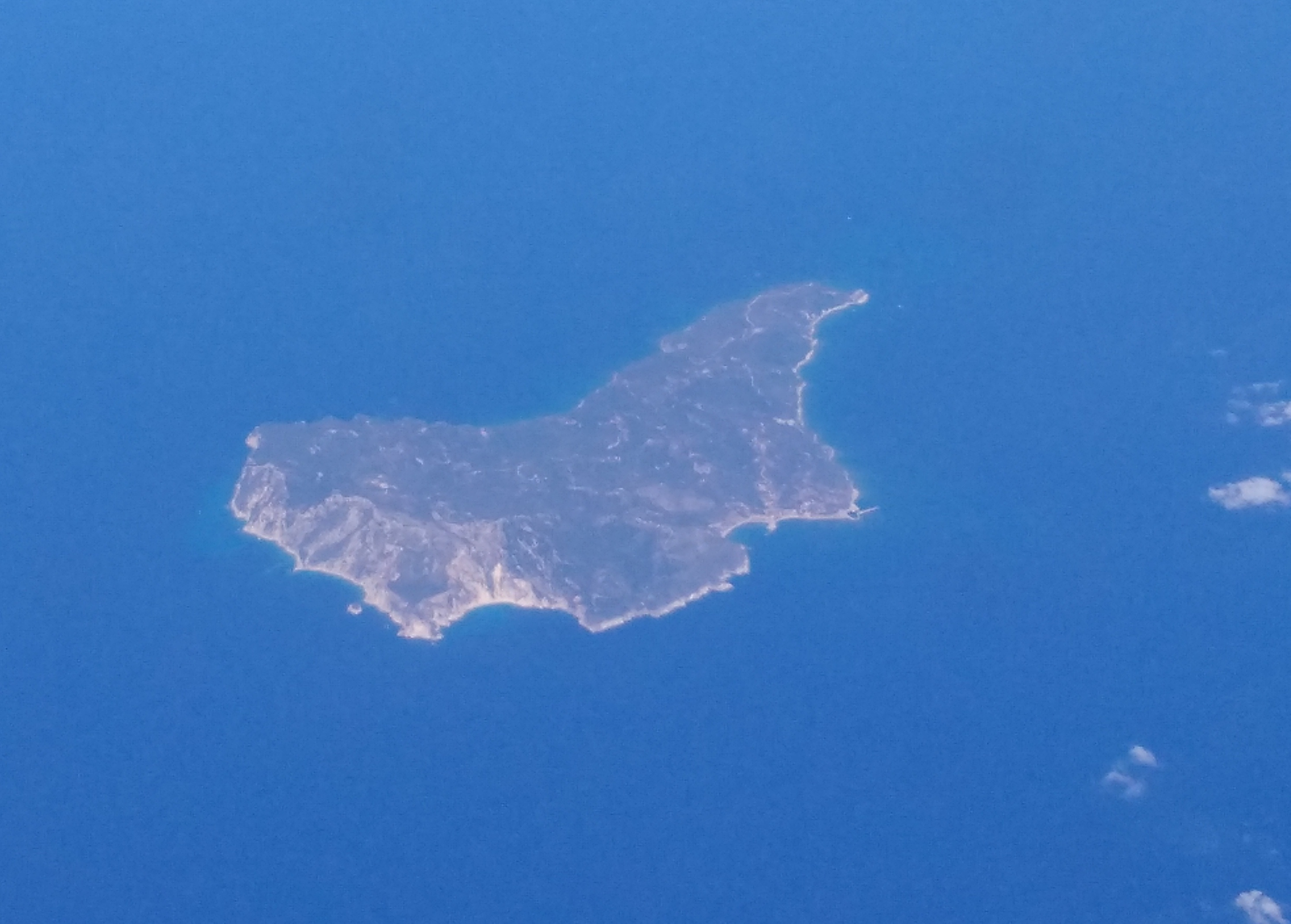 Vue de l'île d'Othoni lors du survol de la mer Adriatique par un avion de ligne Aegean Airlines.